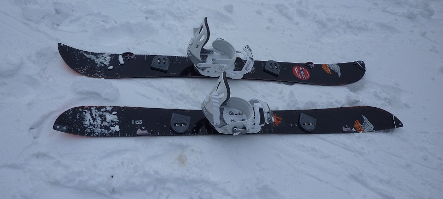 Splitboard mászáshoz (felfelé haladáshoz) előkészítve